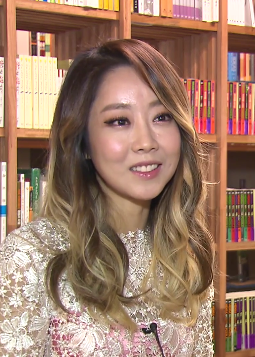 가수 양파의 첫 뮤지컬 '보디가드' 인터뷰